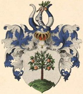 Berendsi suguvõsa aadlivapp